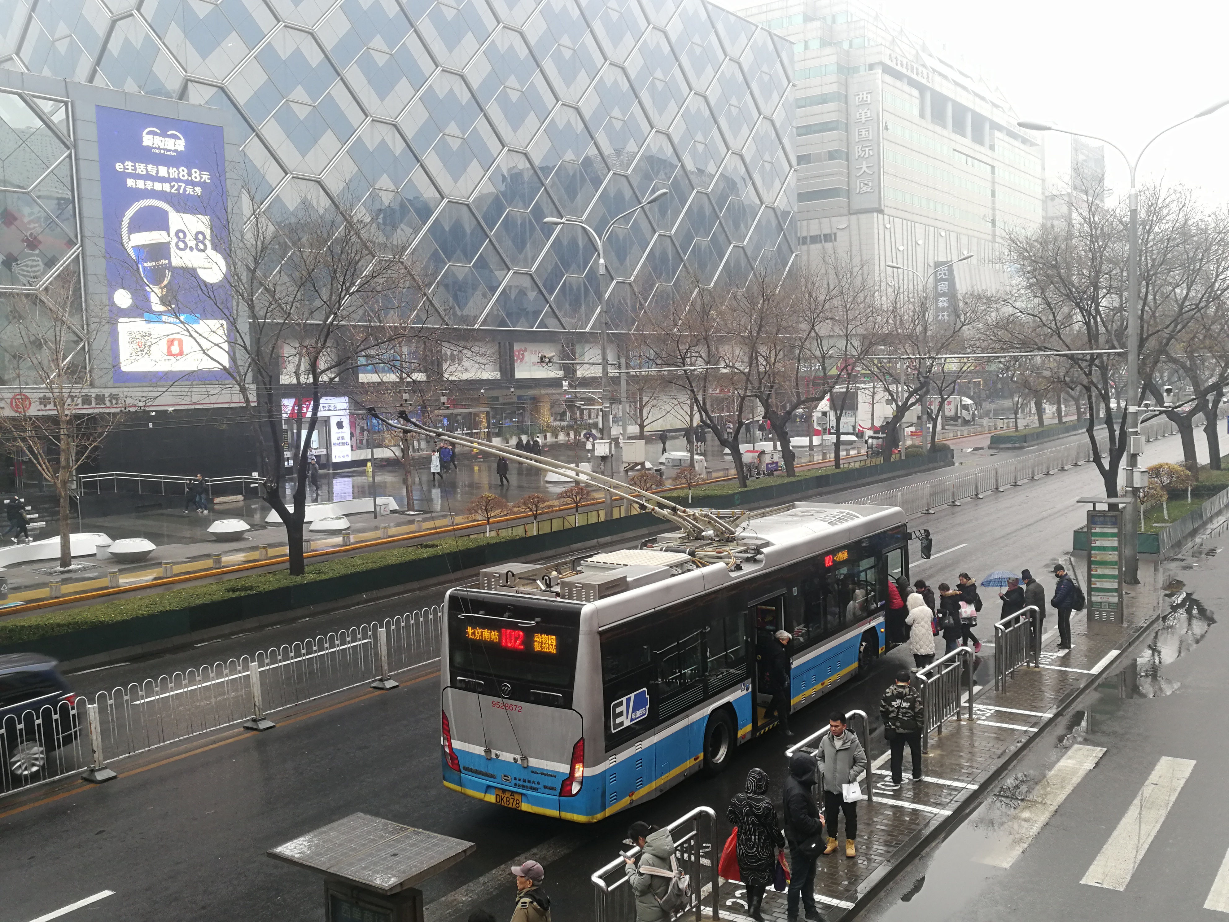 一辆102路无轨电车停靠西单商场公交站Hornjoserbsce: A trolley bus stops at Xidan